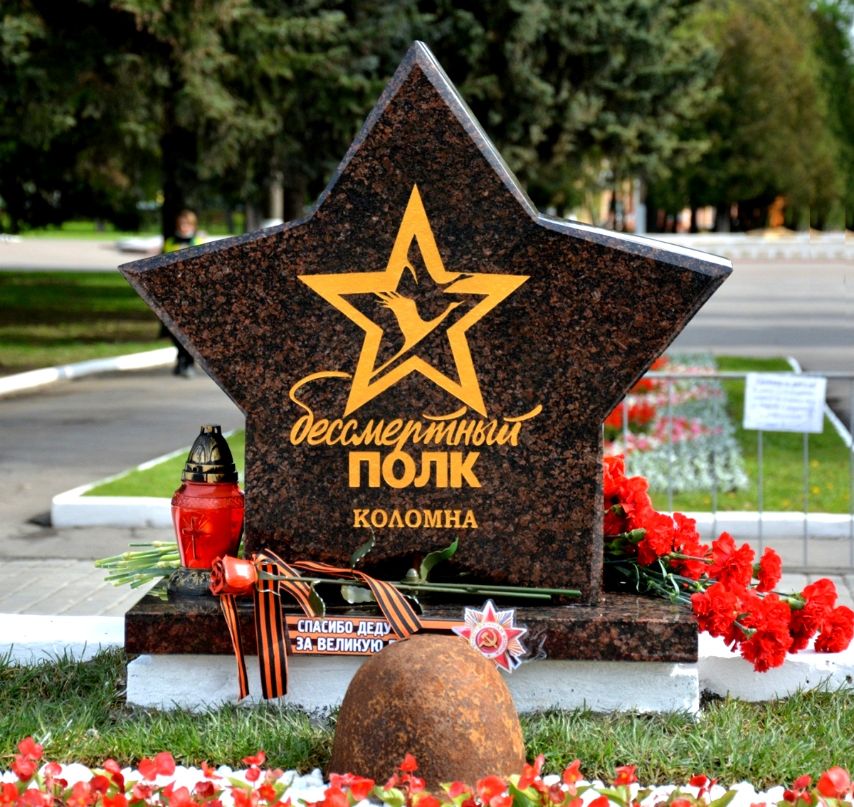 Звезда Бессмертного полка в мемориальном парке г.Коломна